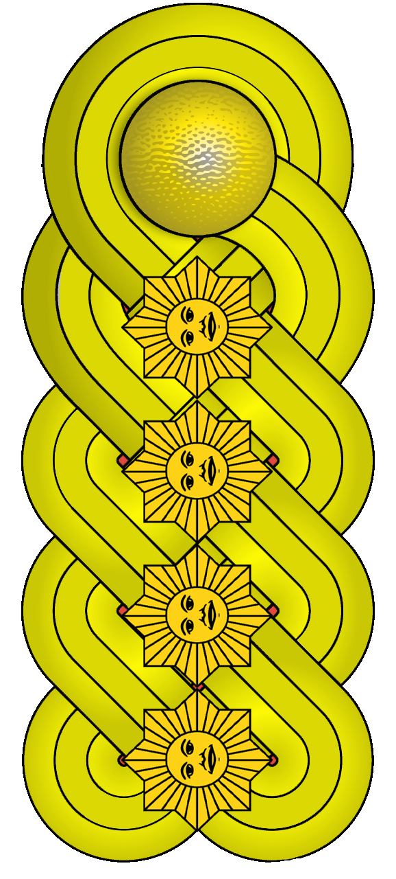 Oficialidad del EJB y la GNB